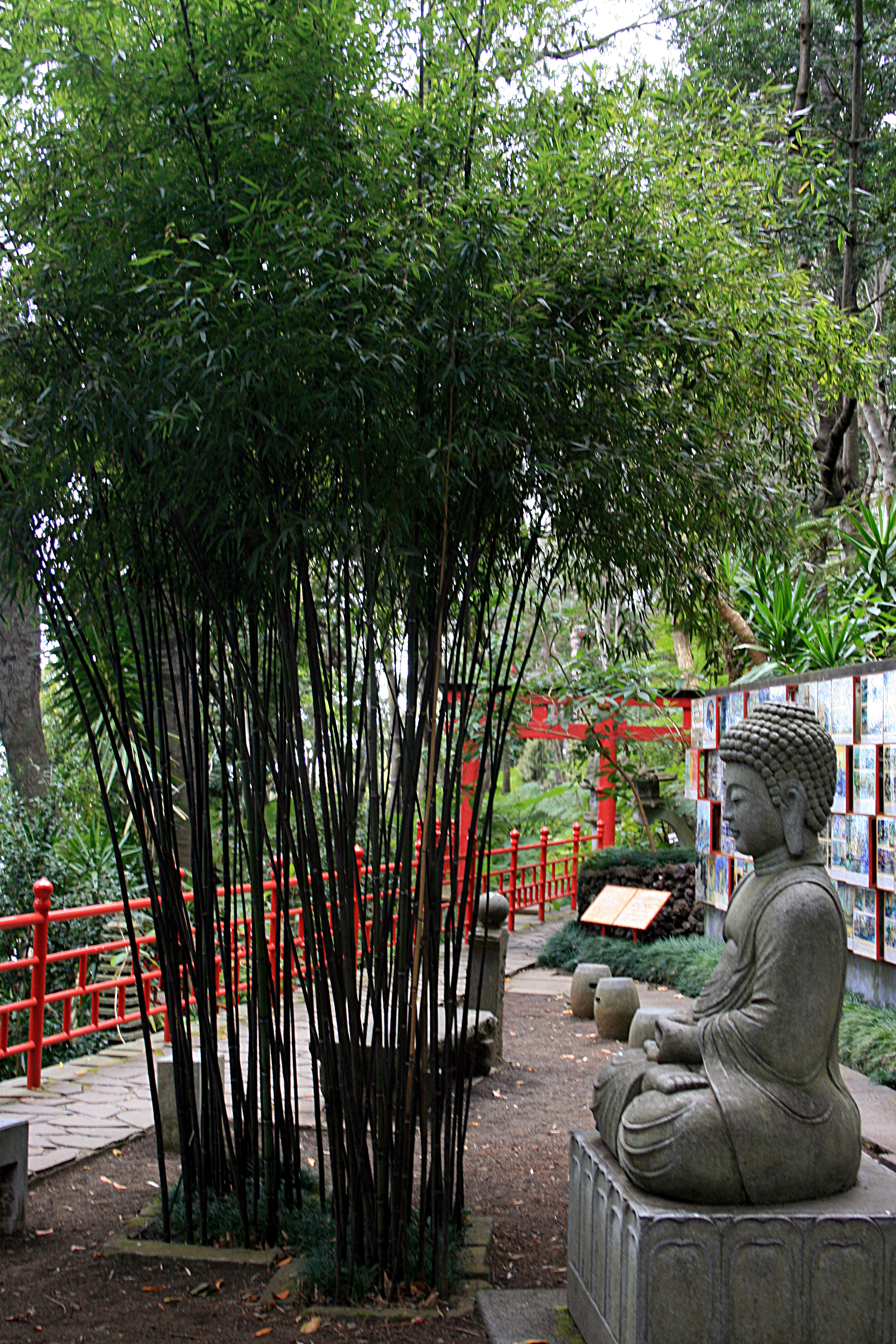 Monte_(Funchal)_-_Phyllostachys_nigra_(Schwarzrohrbambus)